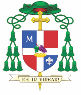 Brasão Dom Francisco